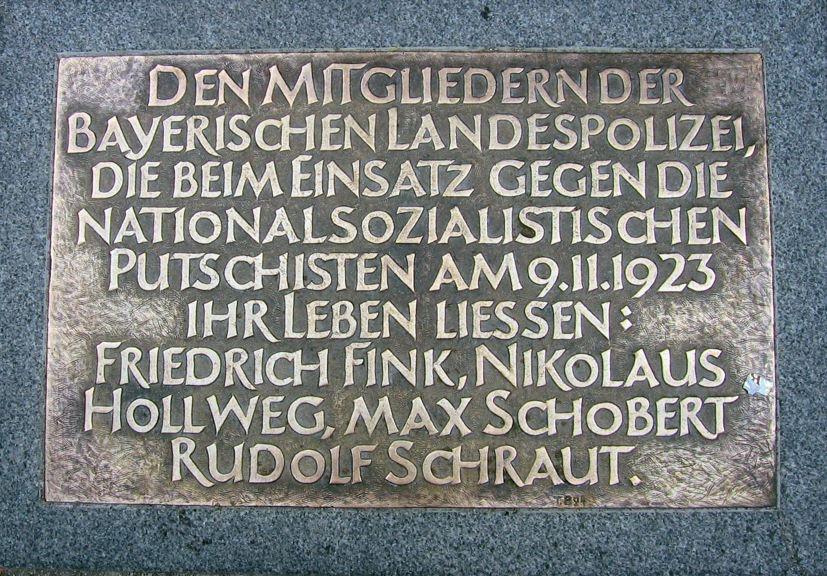 ehemalige Bodenplatte zum Gedenken an die getöteten Polizisten beim Hitlerputsch im November 1923, abgebaut 2011)